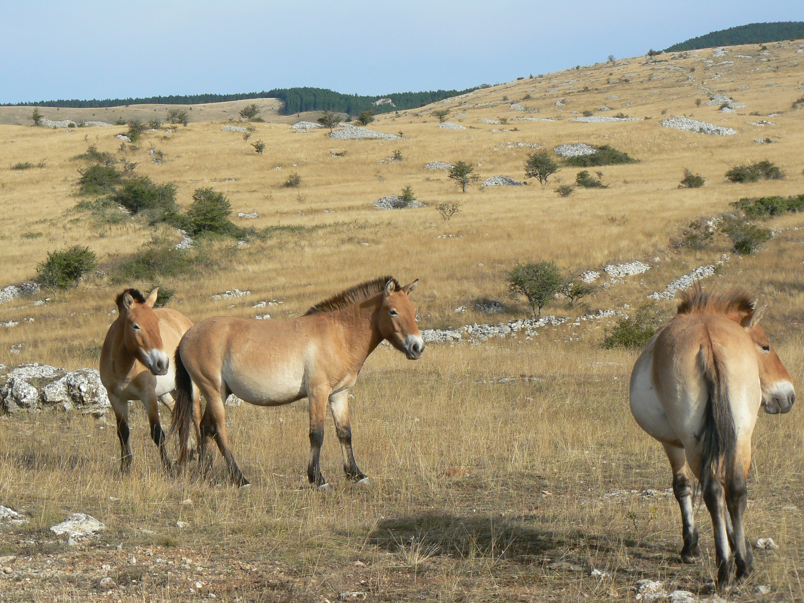 Chevaux de Przewalski sur le causse Méjean en Lozère